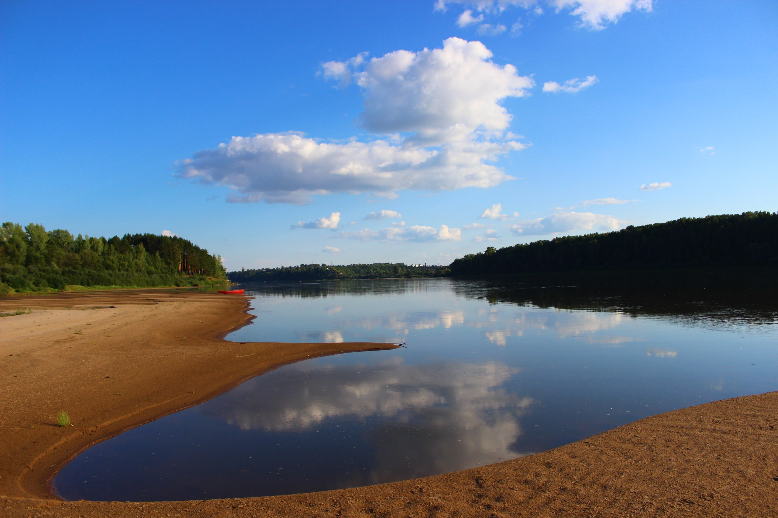 Поющие пески у деревни Атары: Лебяжский район, Кировская область. На правом берегу реки Вятки в районе Атарской излучины (Атарская лука), у бывшего села Атары This image is related to the protected area of Russia number 4310112